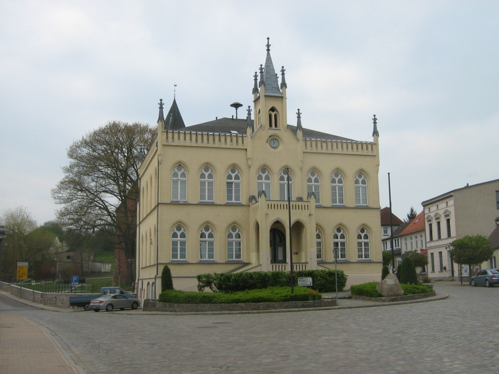 Das Rathaus von Marlow (Landkreis Nordvorpommern, Mecklenburg-Vorpommern)